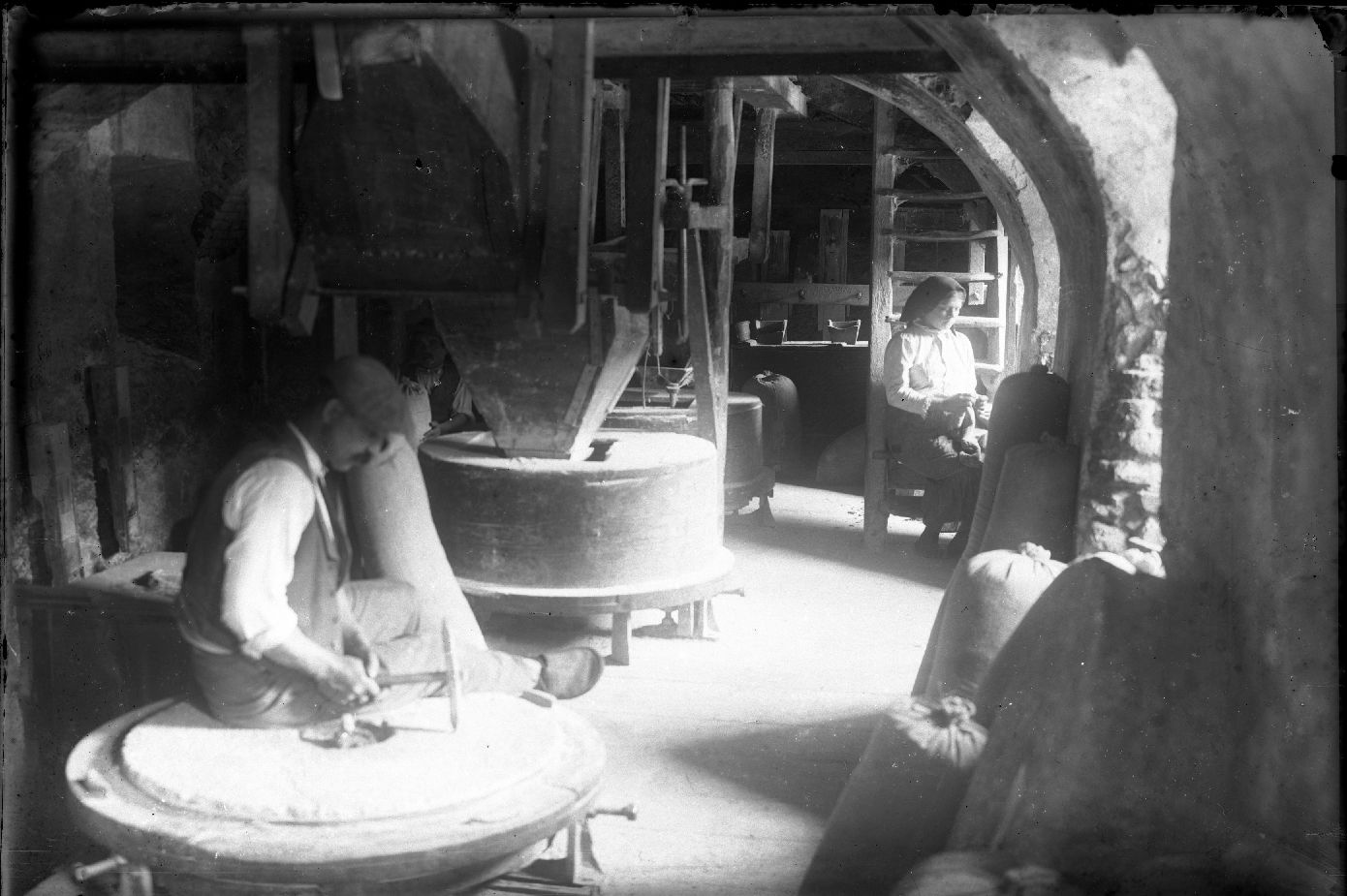 Notranjost mlina v Pobrežju